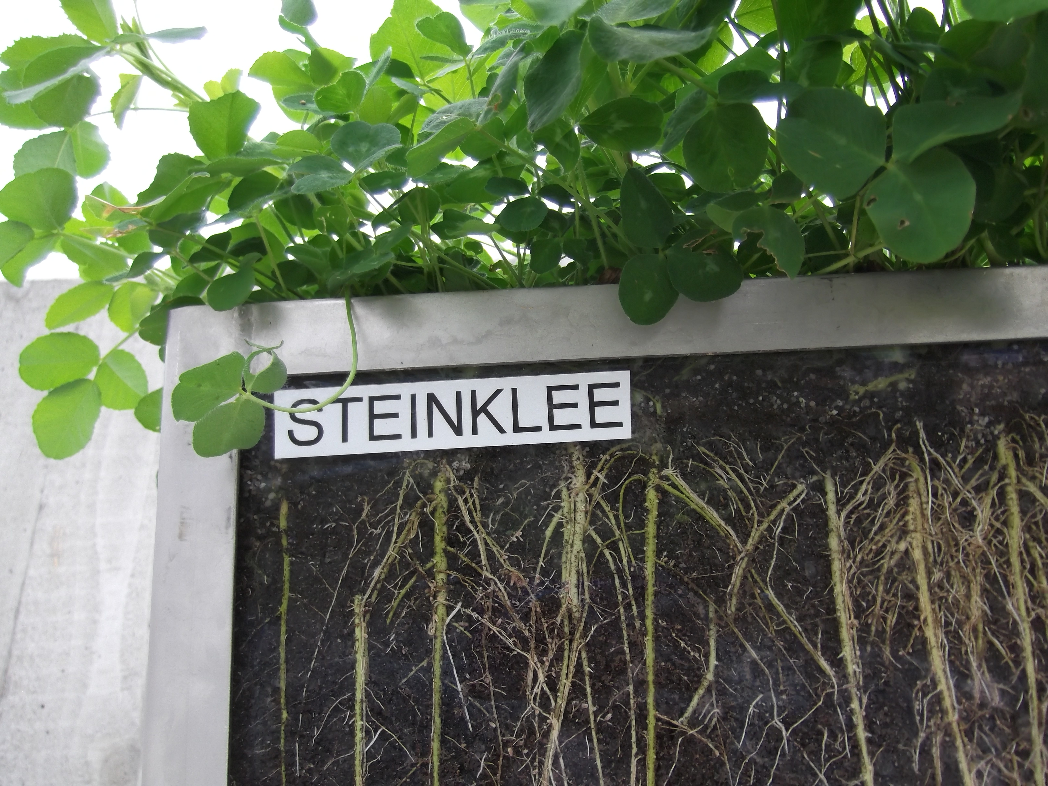 Wurzeln von Klee in Nahaufnahme (das ist ein Ausschnitt der Wurzeln, man sieht nicht die volle Länge). Aufgenommen auf der Landesgartenschau Schwäbisch Gmünd im Mai 2014.